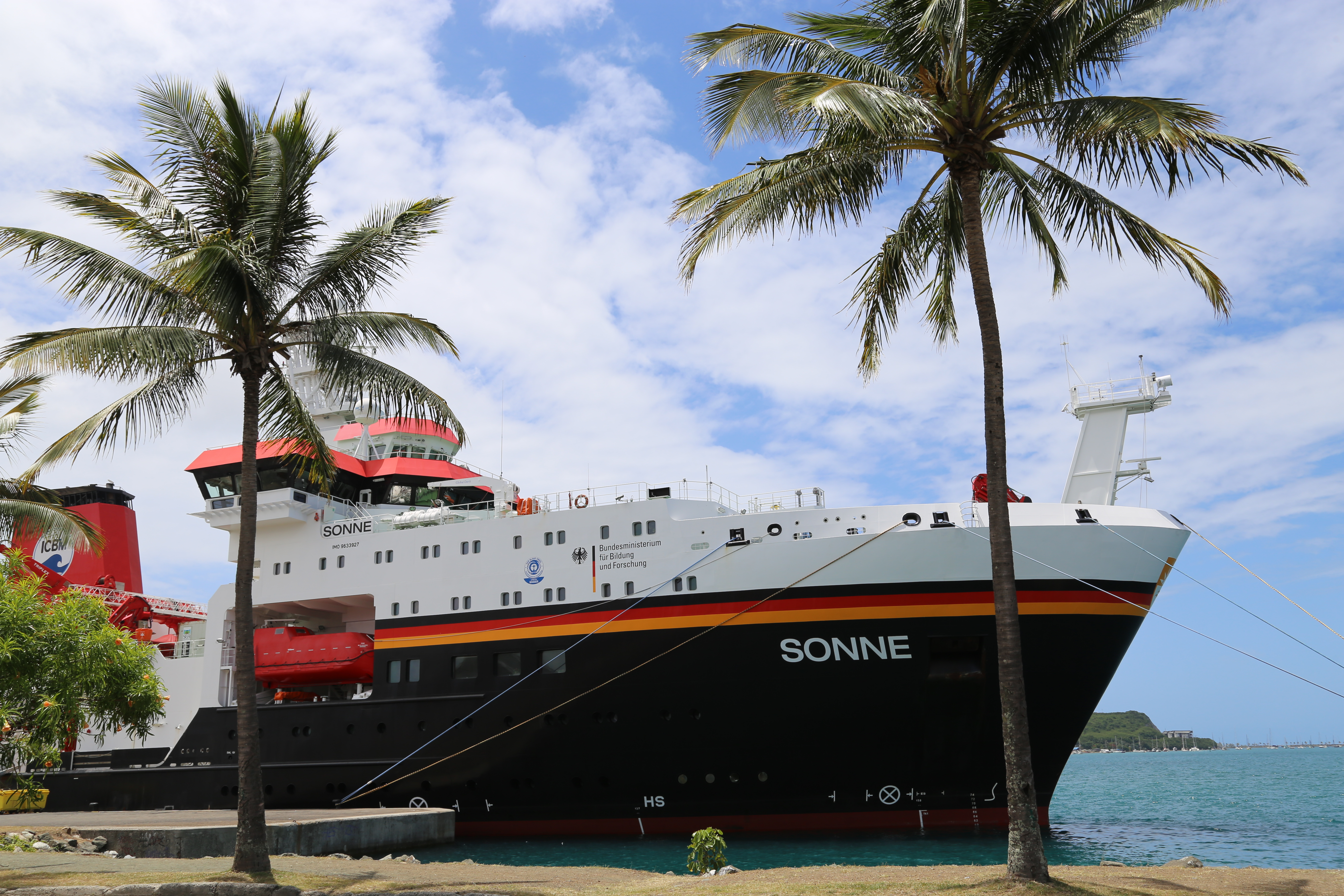 Das neue Forschungsschiff Sonne liegt im Hafen der neukaledonischen Hauptstadt Nouméa. Von dort aus tritt sie ihre Reise in den Kermadec-Vulkanbogen im Südpazifik an.